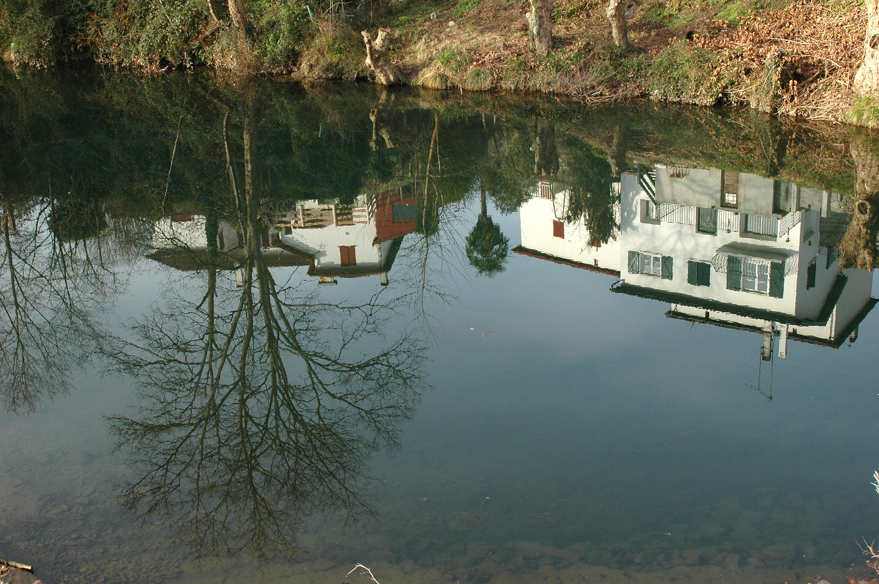 Ustaritz, barrage sur la Nive. Photo prise le 31/12/06 par Harrieta171